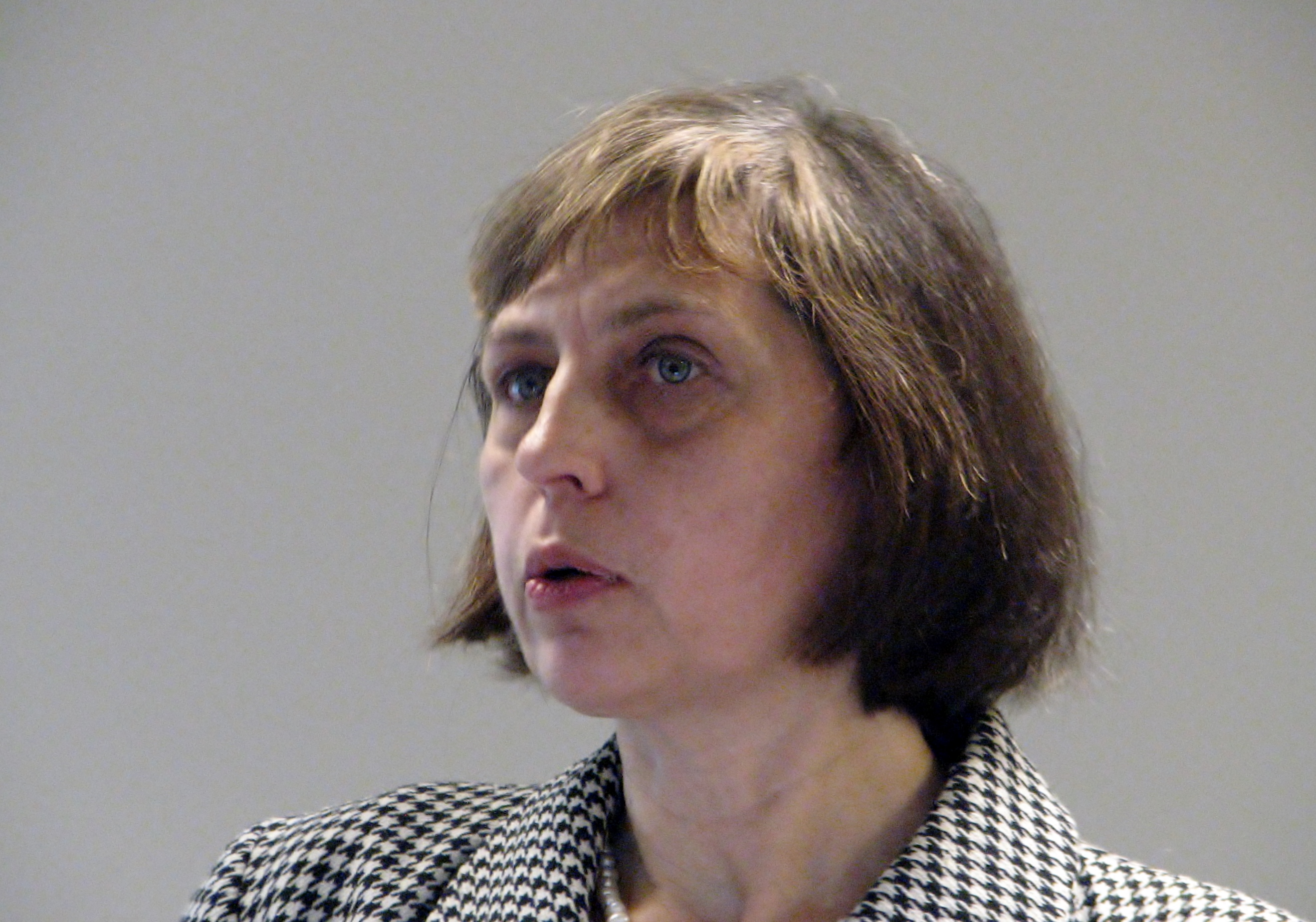 Aile Möldre Eesti raamatu päeval Rahvusraamatukogus